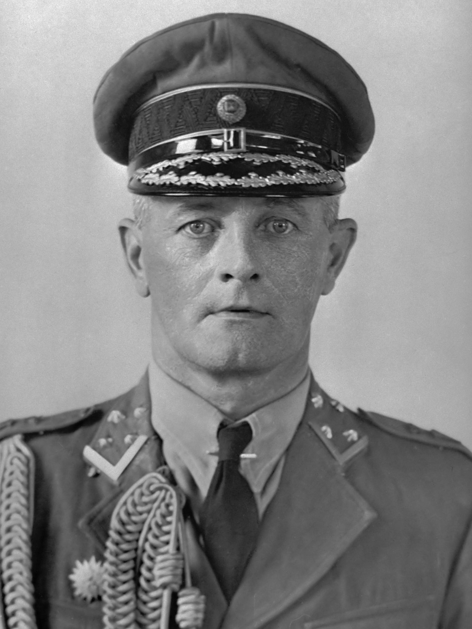 Luitenant-Generaal L.H. van Oyen, commandant van de Militaire Luchtvaart KNIL in Nederlands-Indië 1943